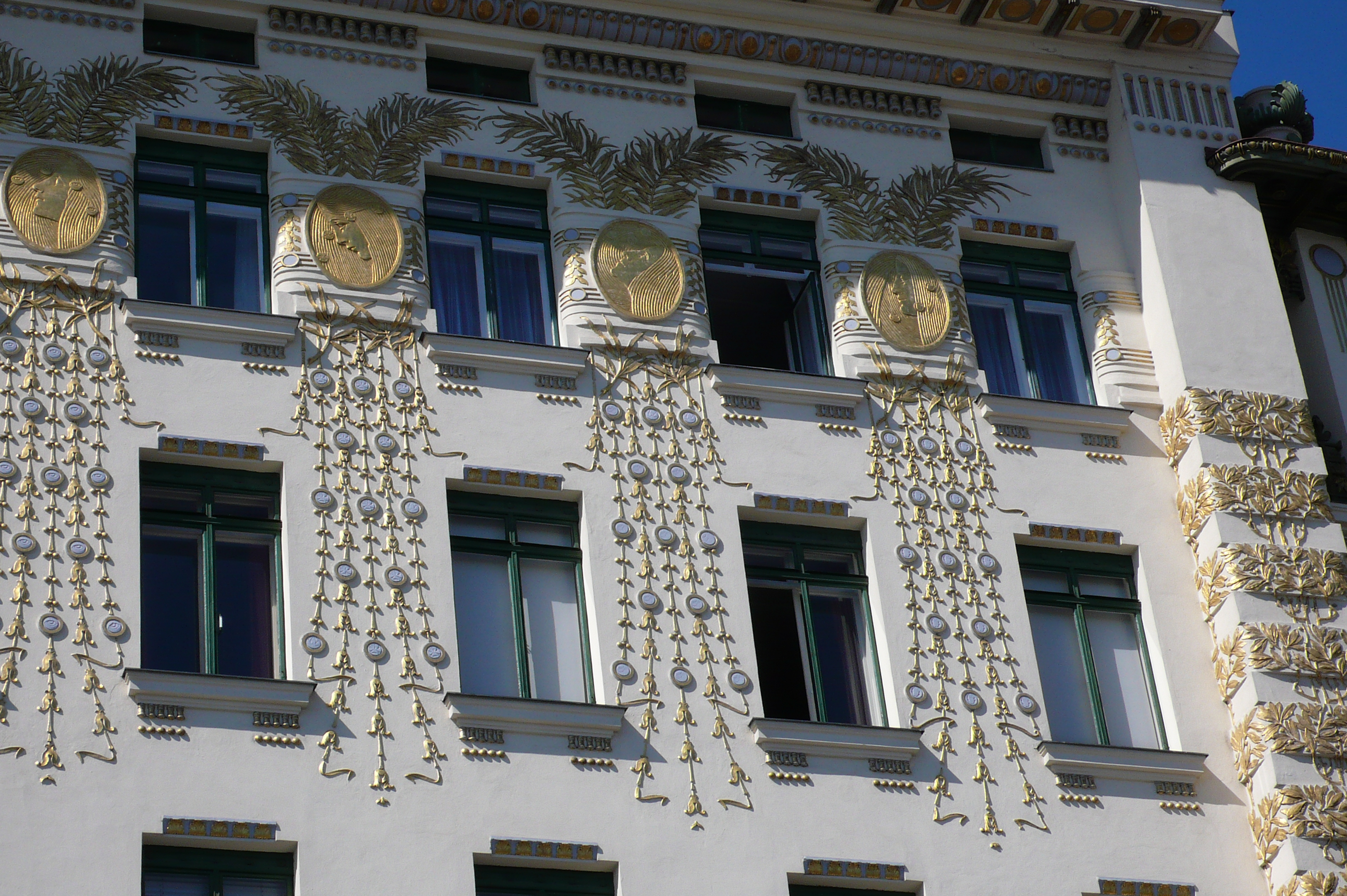 Wien, Wienzeile 38 (Otto Wagner); Deko von Koloman Moser